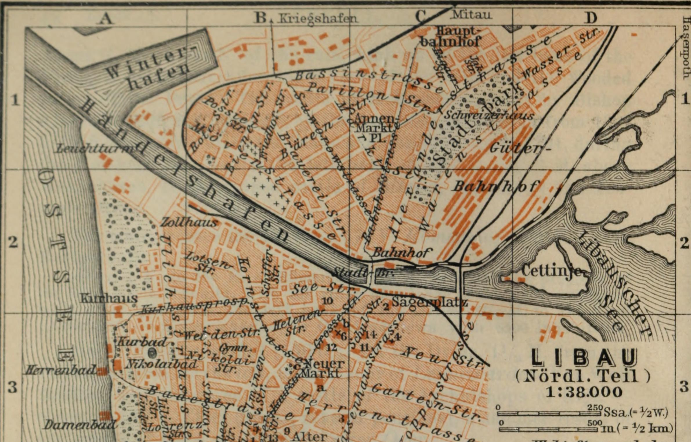 Libau - Liepāja